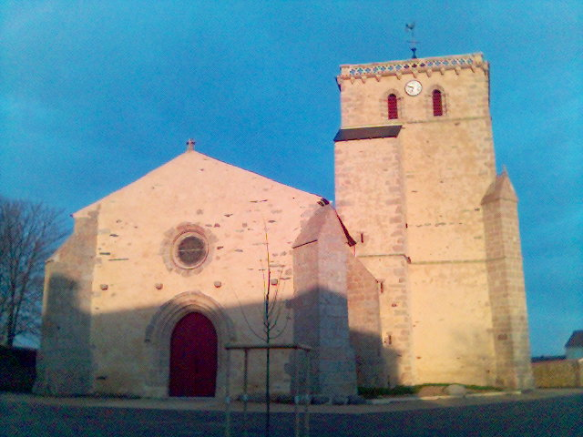 L'église de la commune de Thorigny après rénovation.